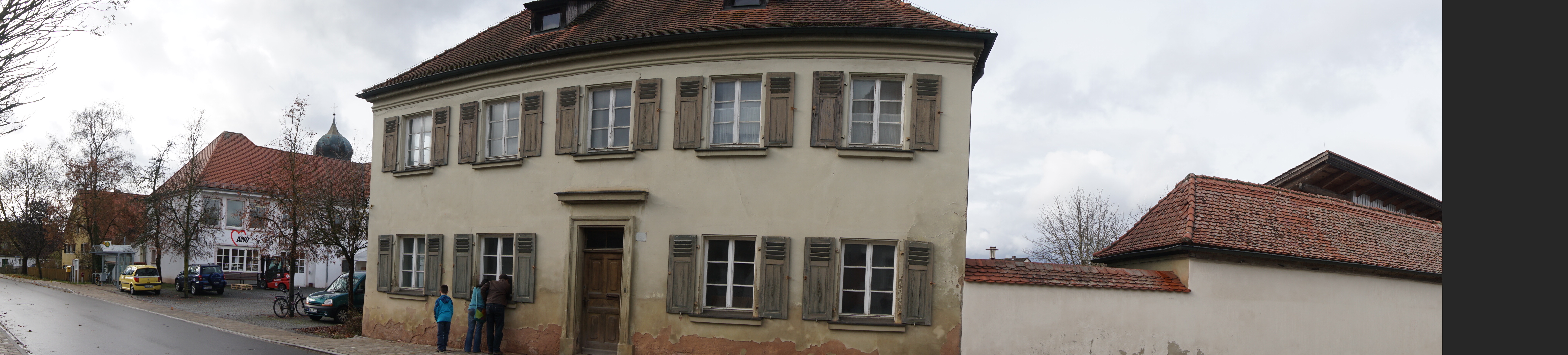 Panorama Allodium Cronheim